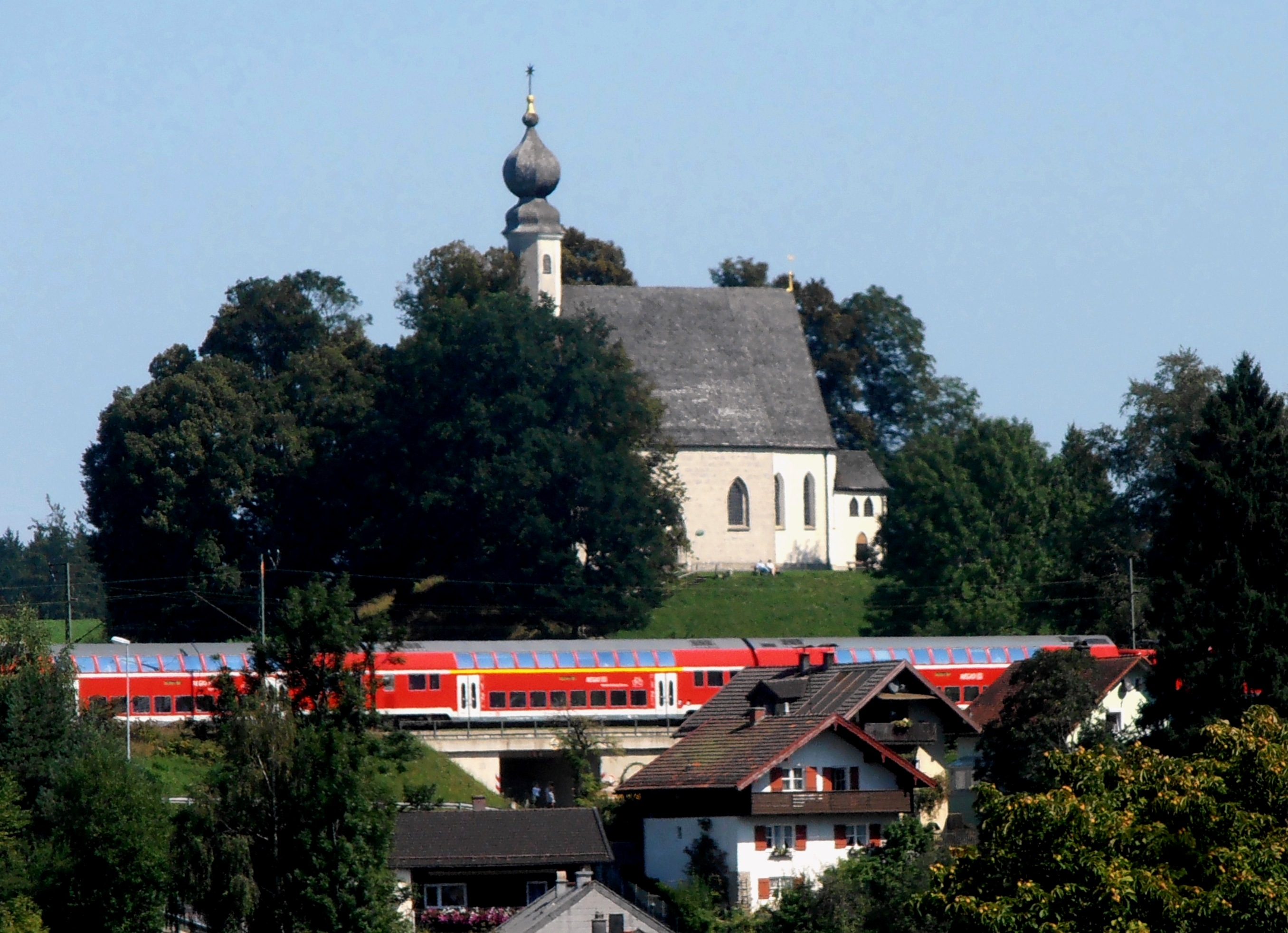 St. Vitus und Anna in Ettendorf, Gemeinde Surberg